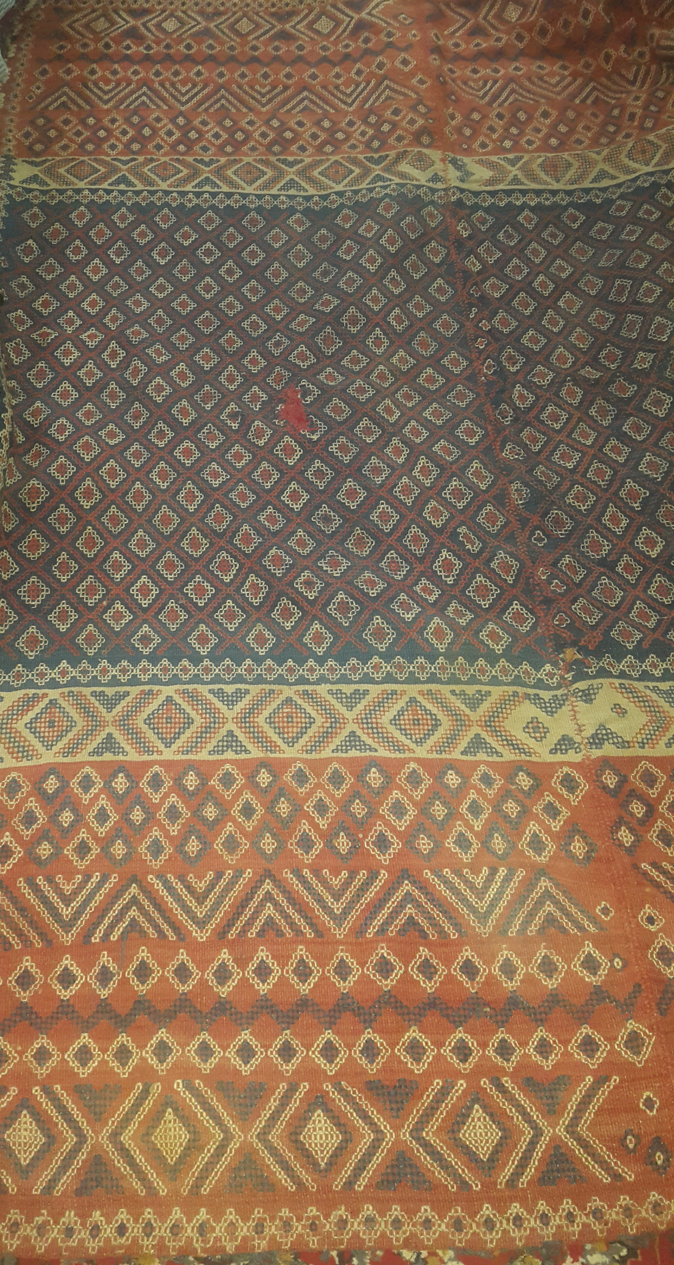 مازِرونی: Baft ghadimi